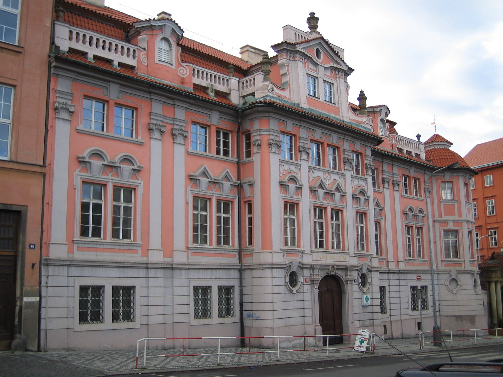 Faustův dům v Praze. Vlastní fotka.